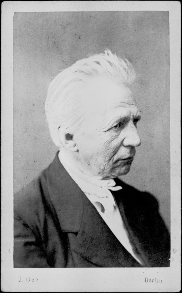 Spätes Brustbild Edaurd Grells